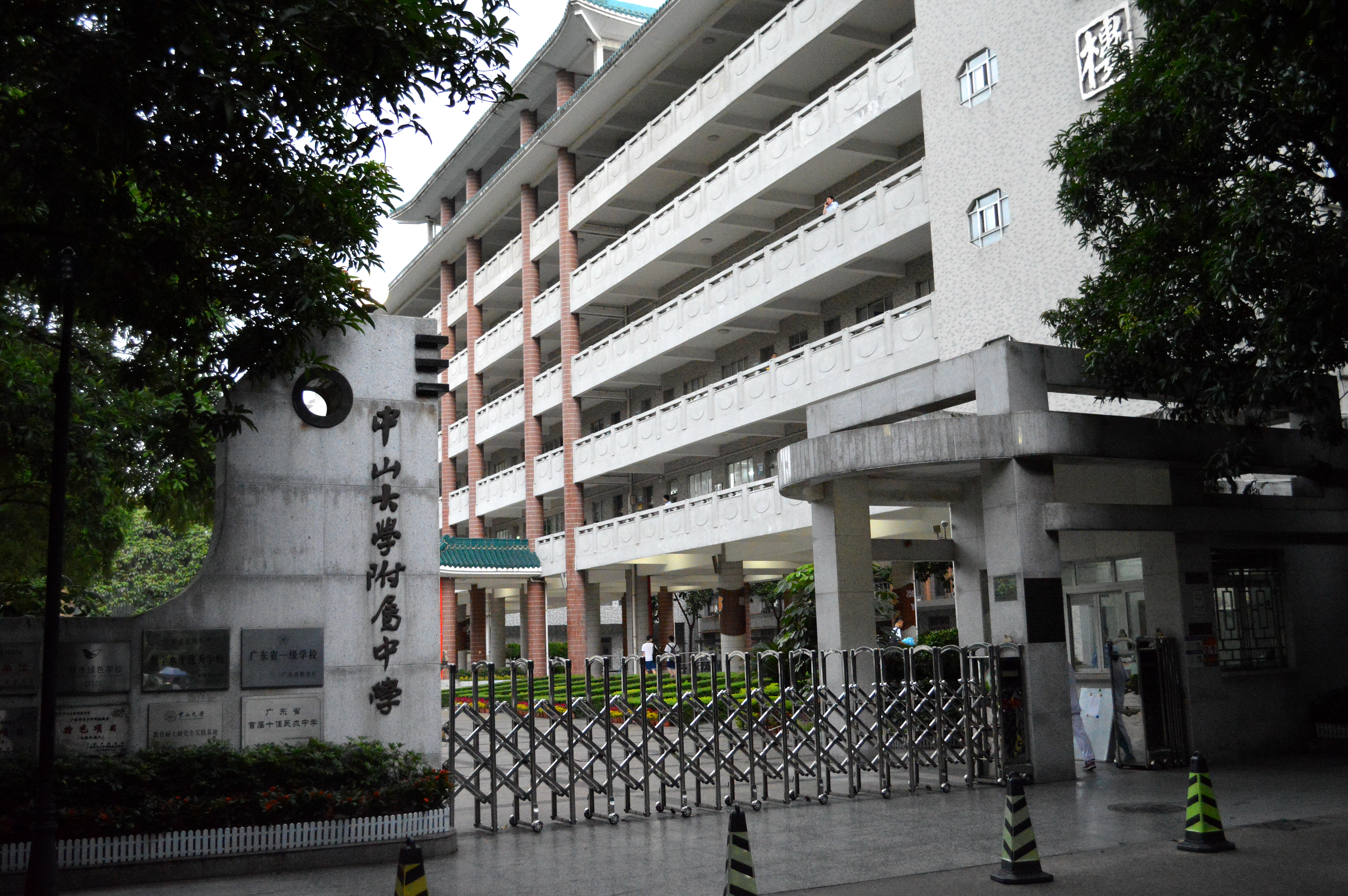 中山大学附属中学校门